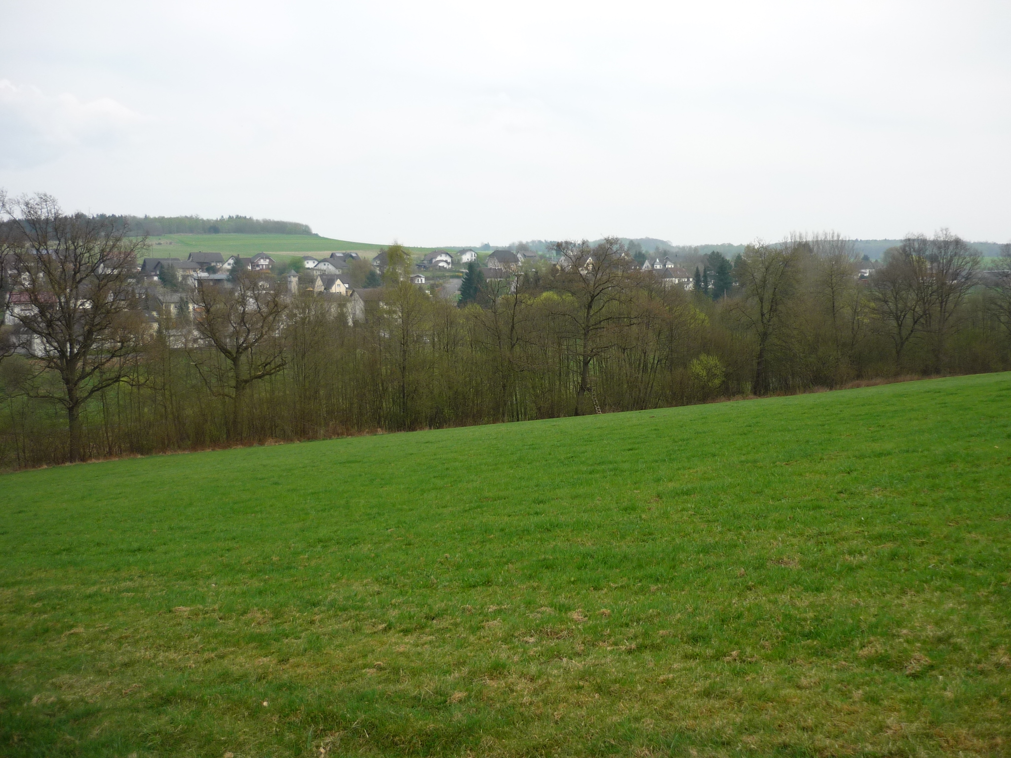 Ingelbach